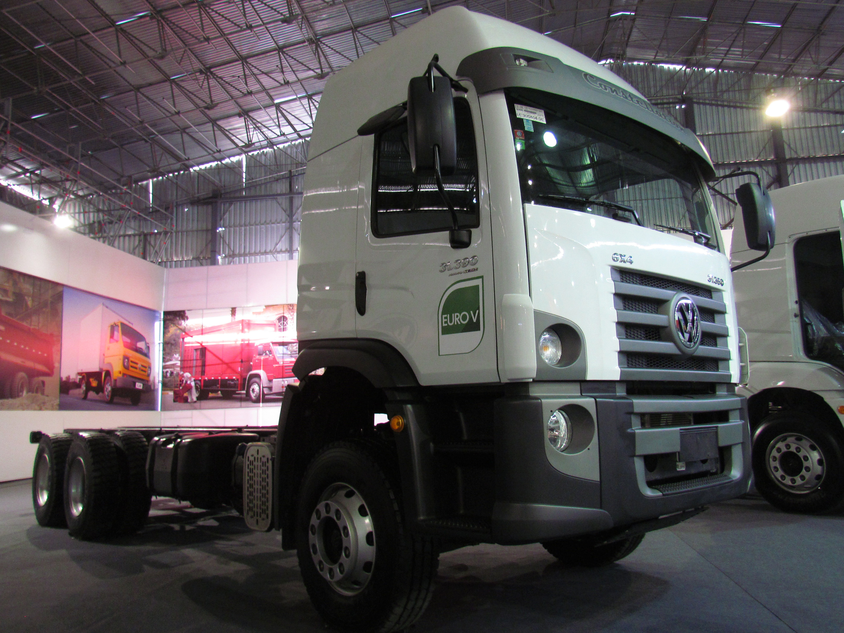 Volkswagen 31.390 Constellation 6x4 2014